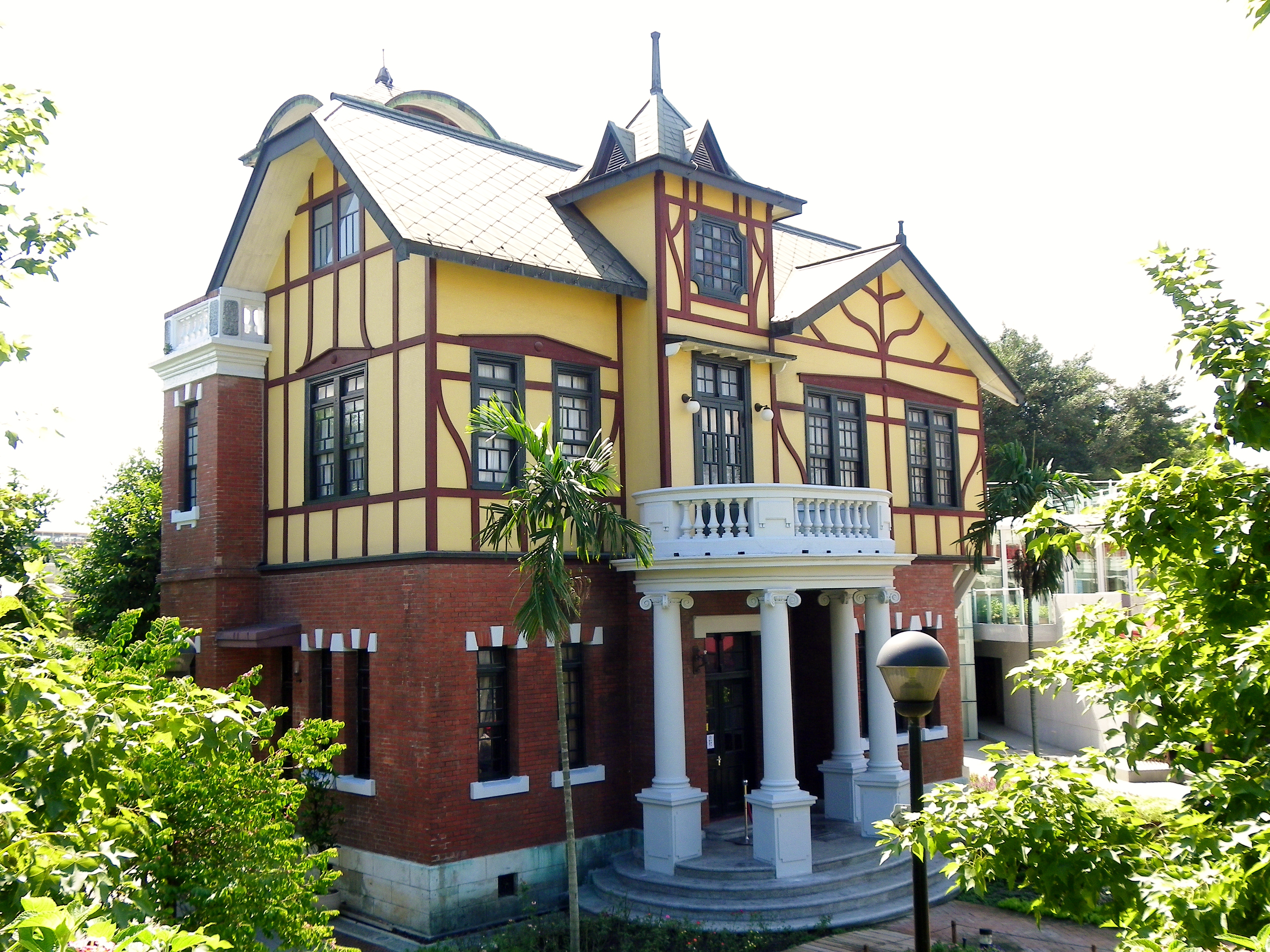 臺北市中山區臺北故事館（原圓山別莊）。